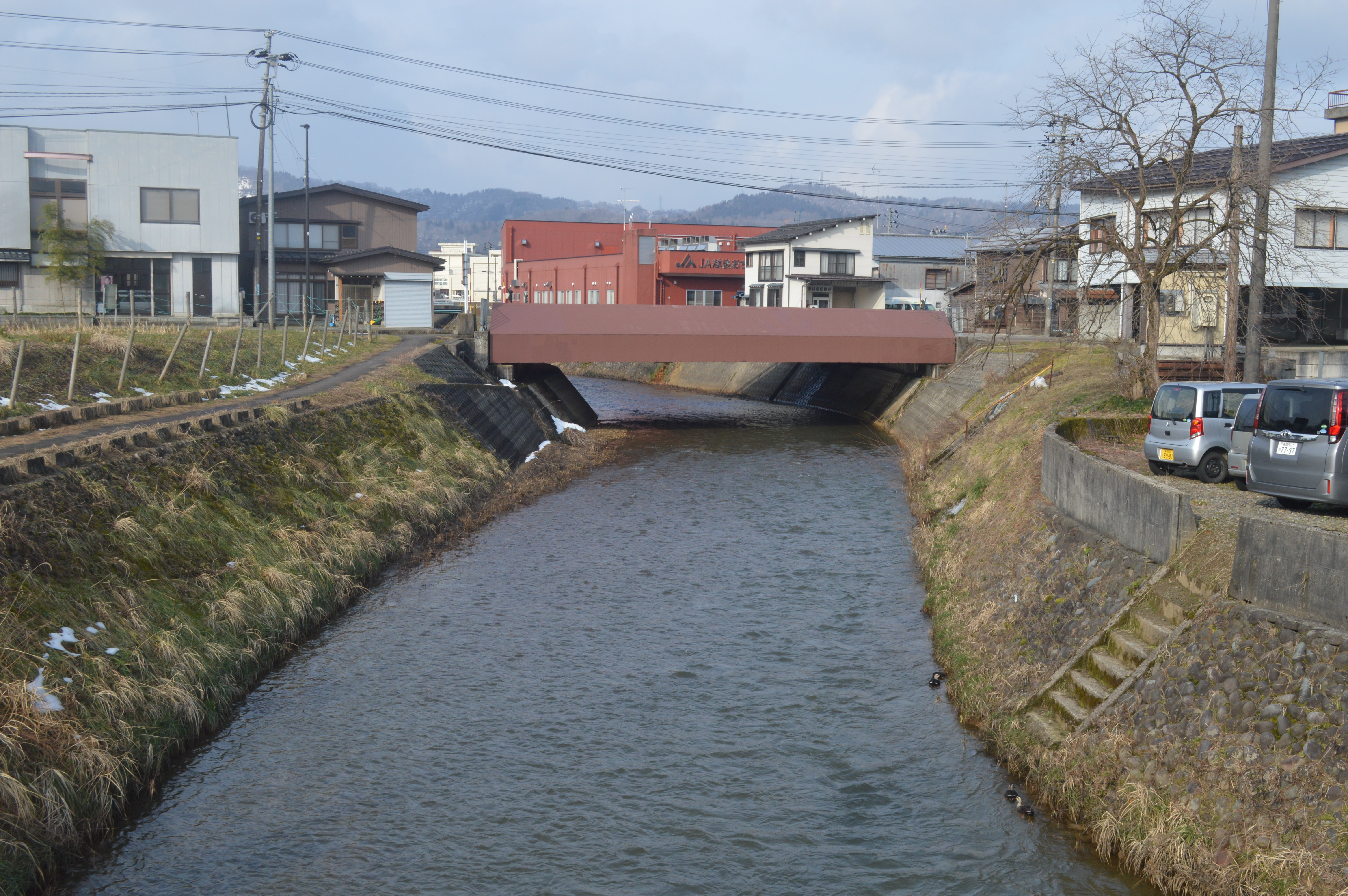 新潟県小千谷市を流れる茶郷川。信濃川の支流。